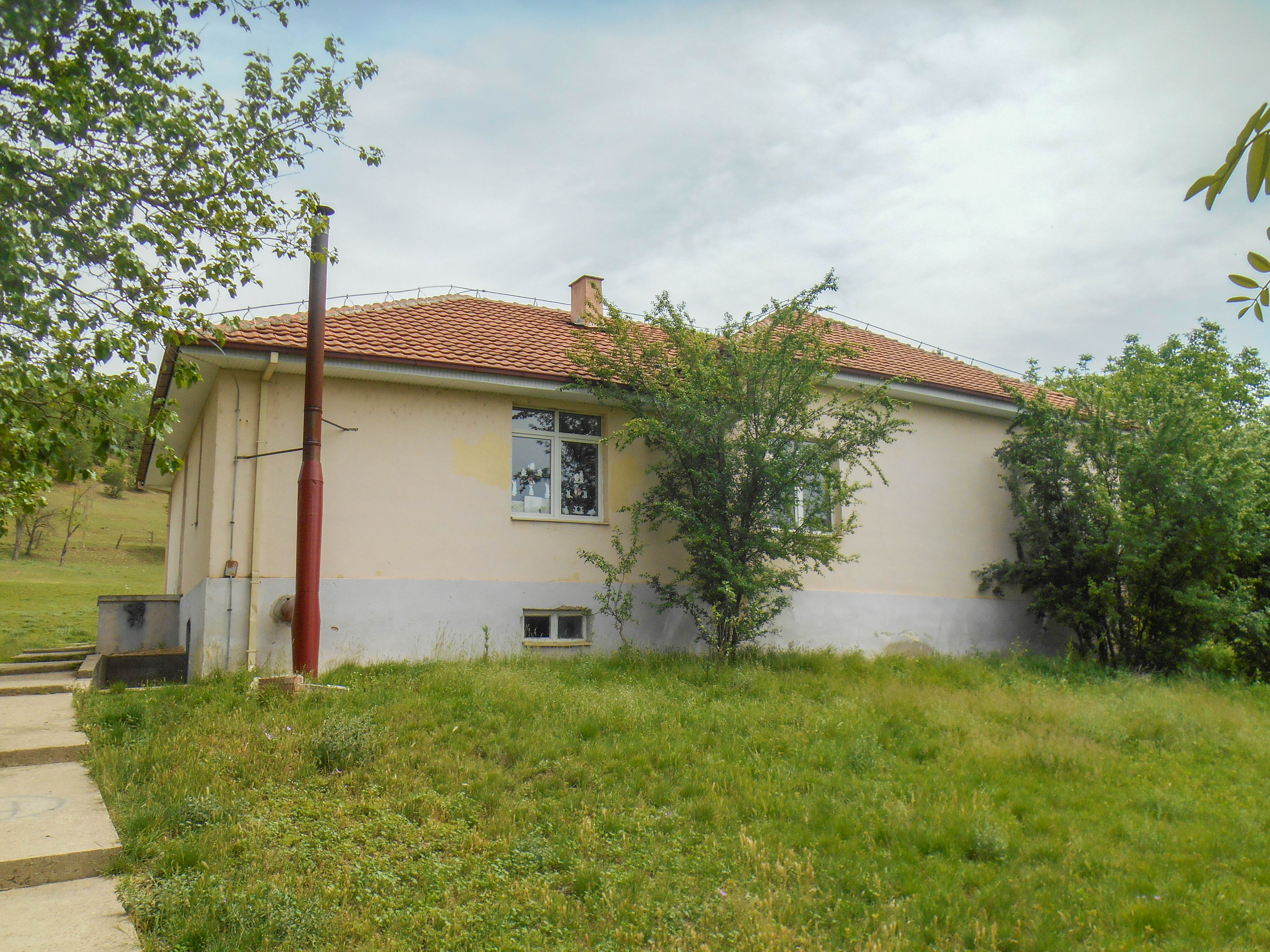 Основно училиште „Гоце Делчев“ - Сушево